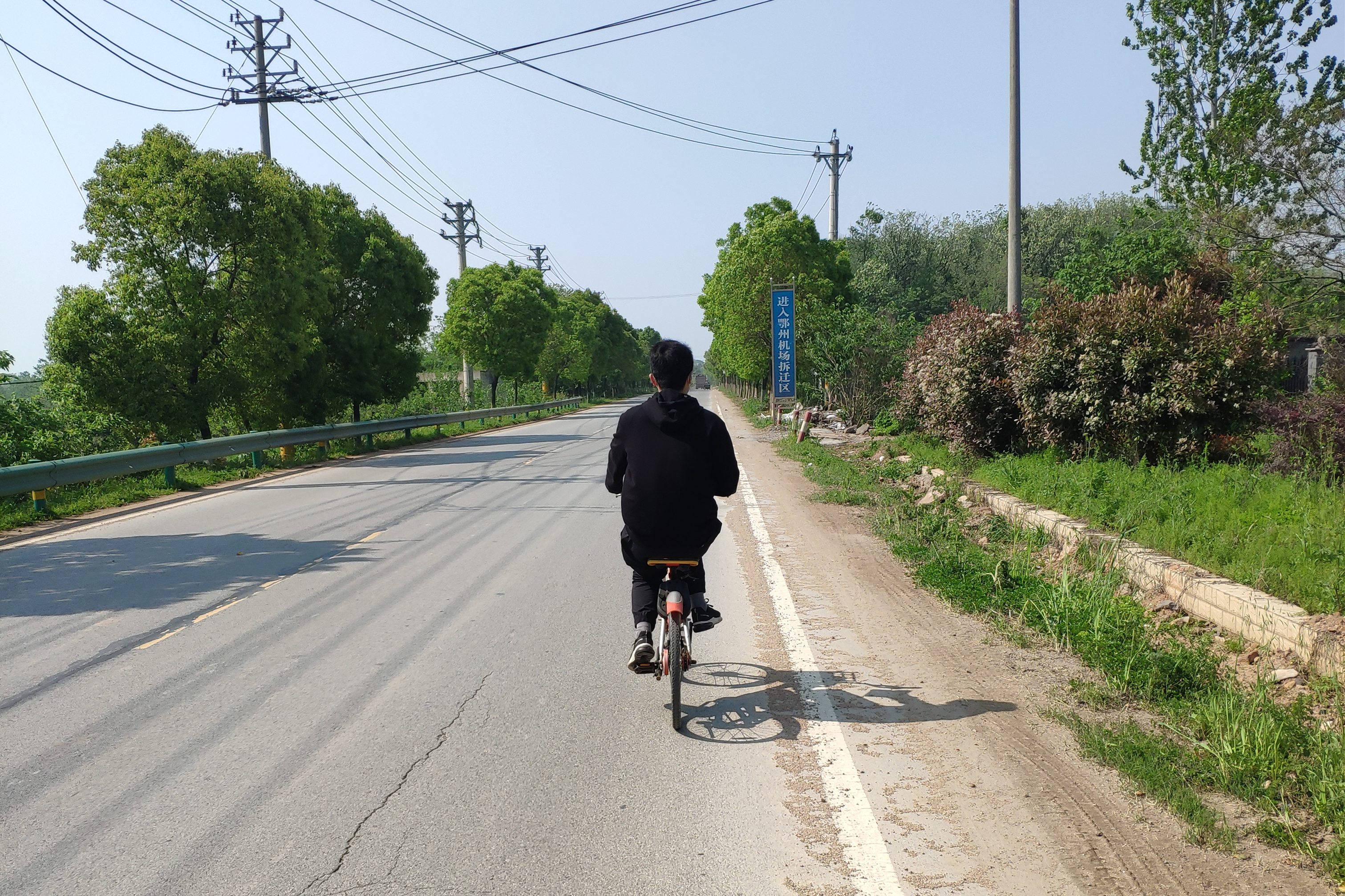 中文（中国大陆）: 进入鄂州机场拆迁区域